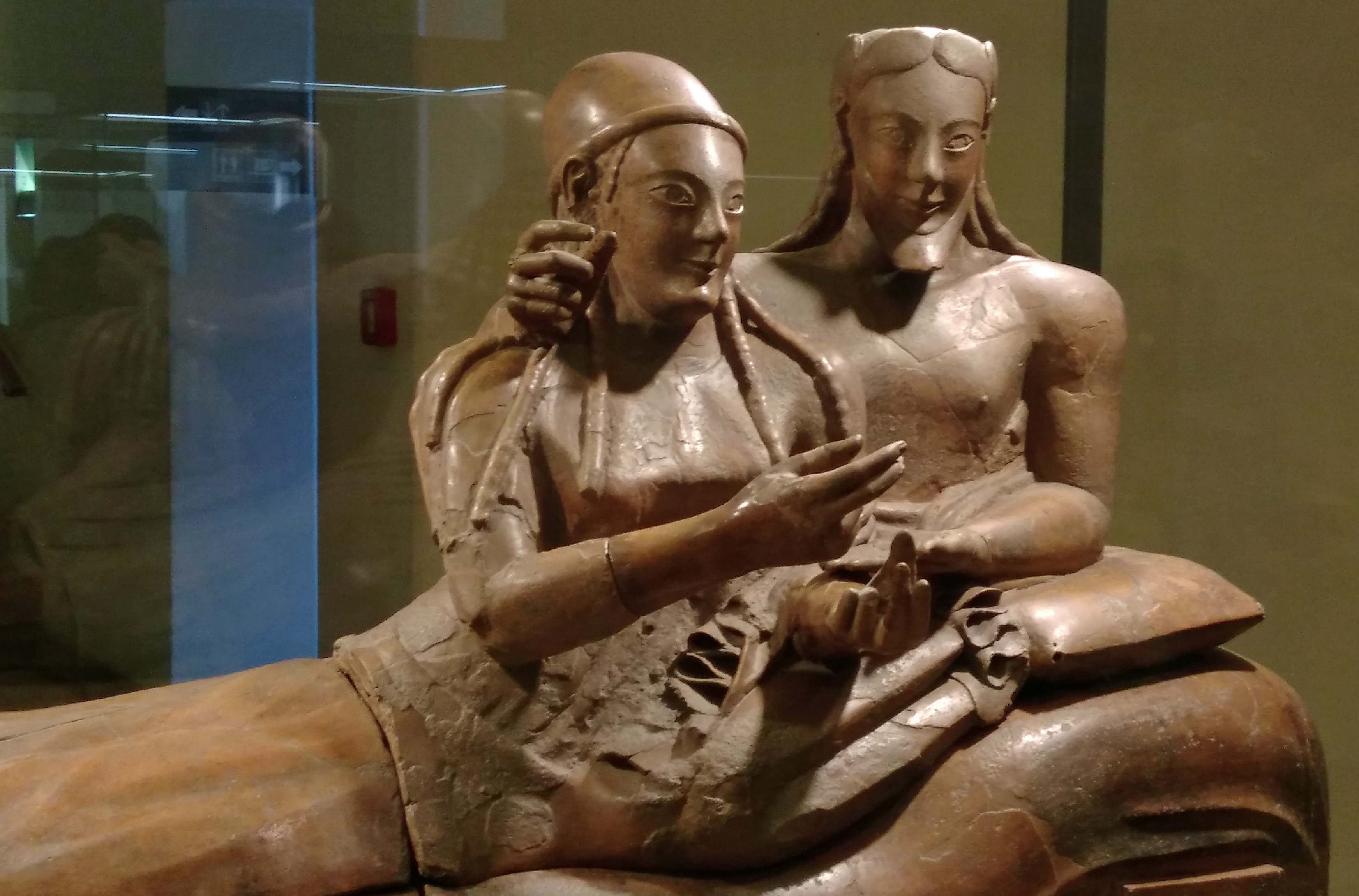 Sarcophage des époux, symbole de Cerveteri. La tombe, des années 530 - 520 av. JC, a été découverte à la Banditaccia à la fin du 19e s., cassée en 400 fragments, avec les cendres des défunts.